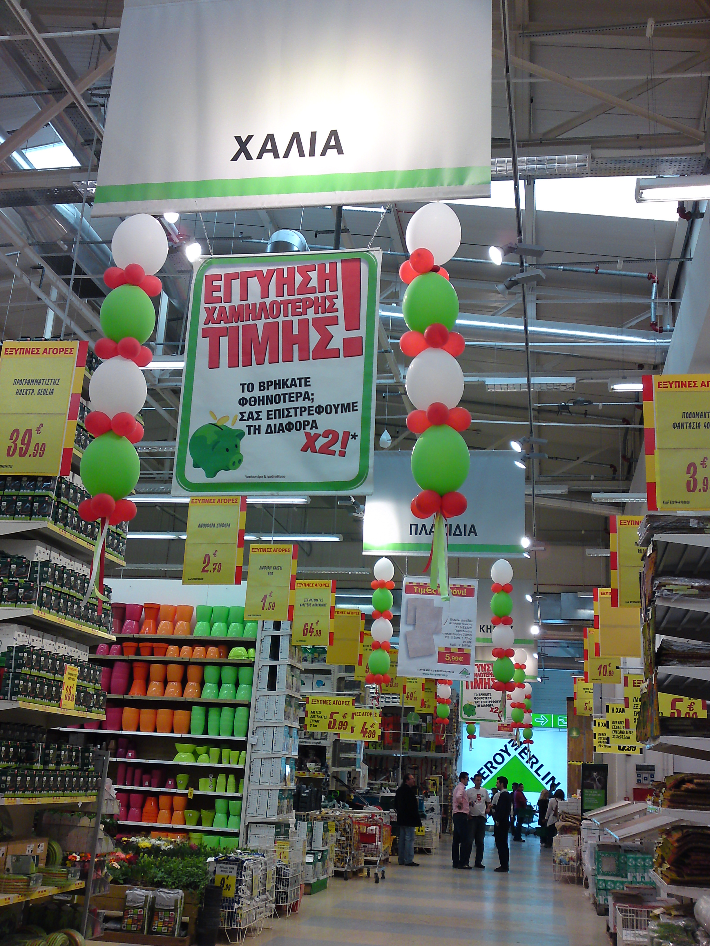 Rayon d'un magasin Leroy Merlin grec.